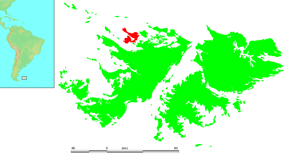 Falkland Islands - Saunders Island.PNG